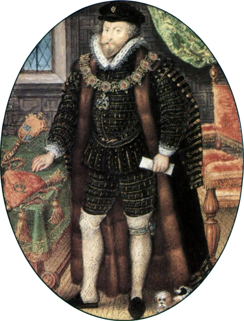 Porträt des Sir Christopher Hatton, Oval